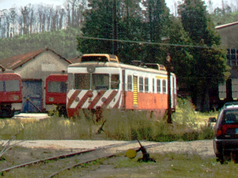 Automotora CP 9307